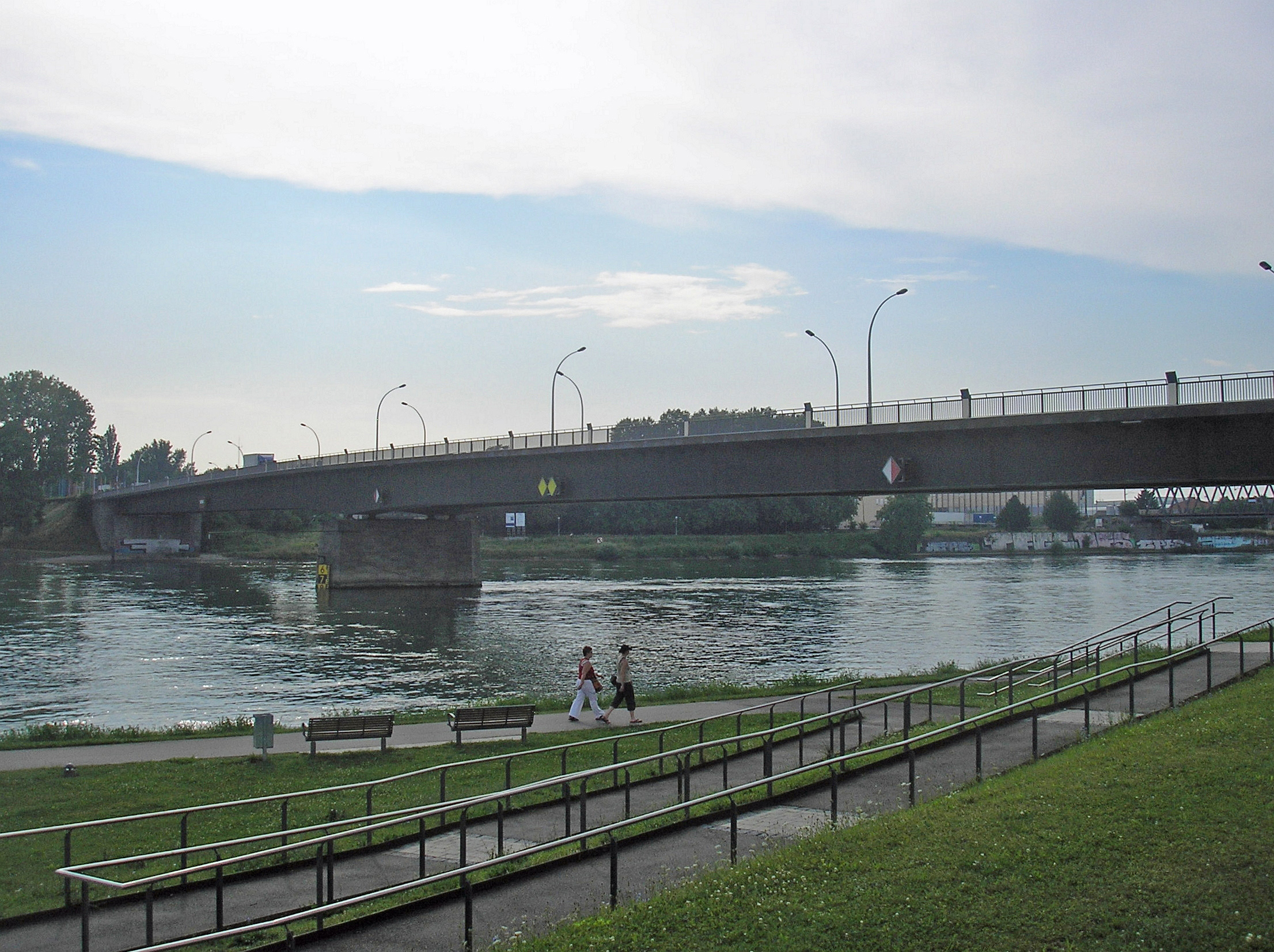 Europabrücke bei Kehl